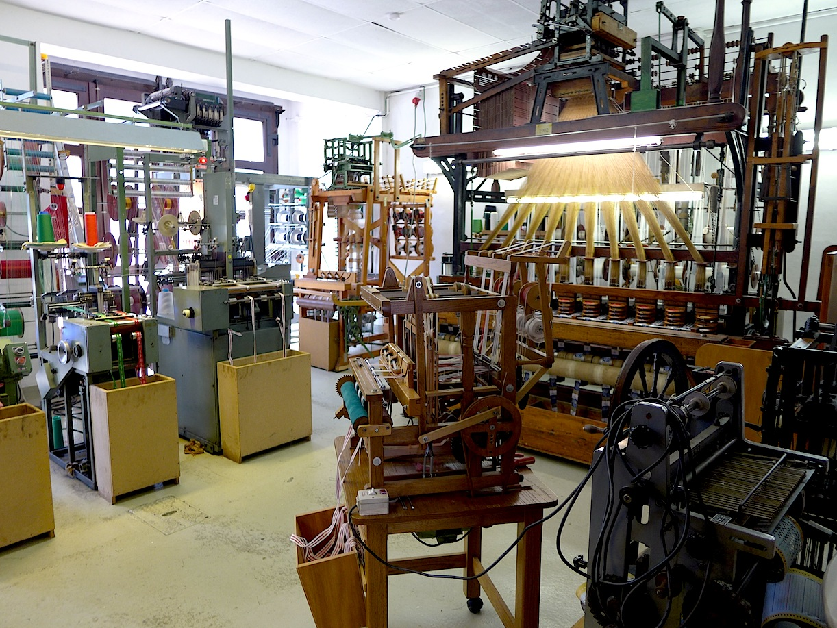 Bandautomaten (links), ein Jacquard-Bandwebstuhl (hinten rechts) und weitere Ausstellungsstücke im Bandwebereimuseum Elfringhausen, Hattingen, Deutschland.